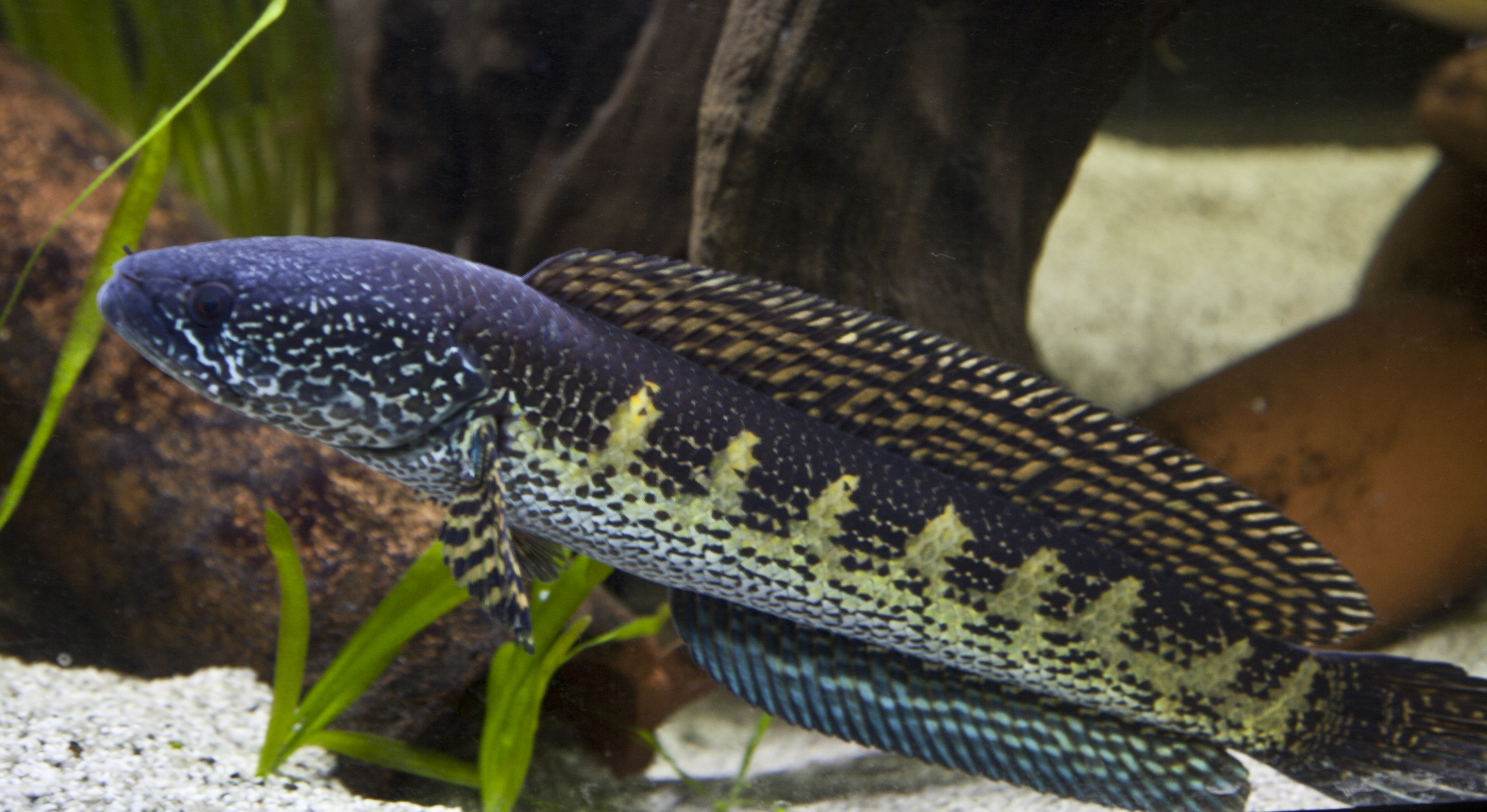 Channa aurantimaculata, Goldfleck-Schlangenkopffisch im eigenen Aquarium